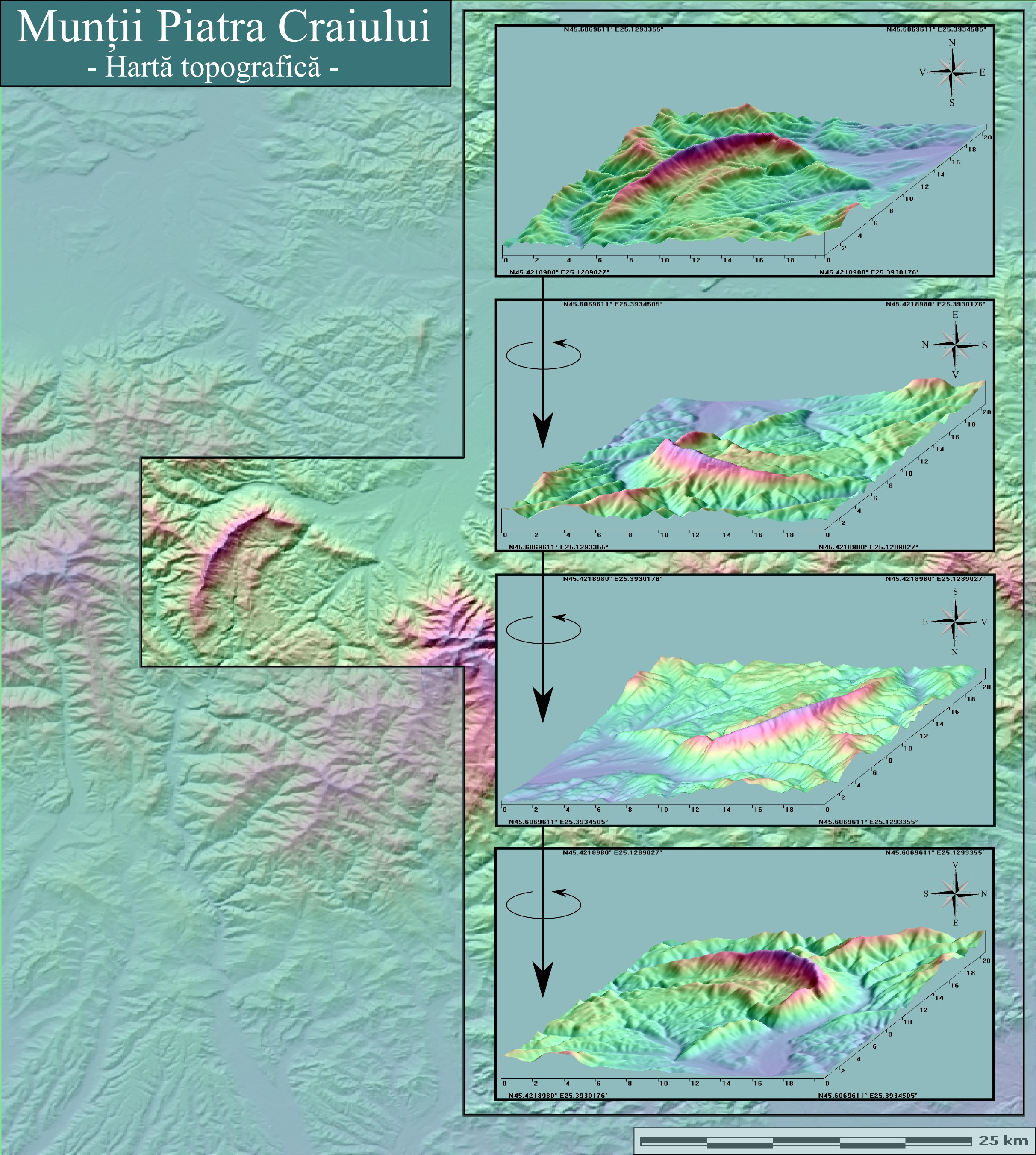 Munţii Piatra Craiului, reprezentare topografică. Imaginea a fost creată după date SRTM furnizate liber de NASA